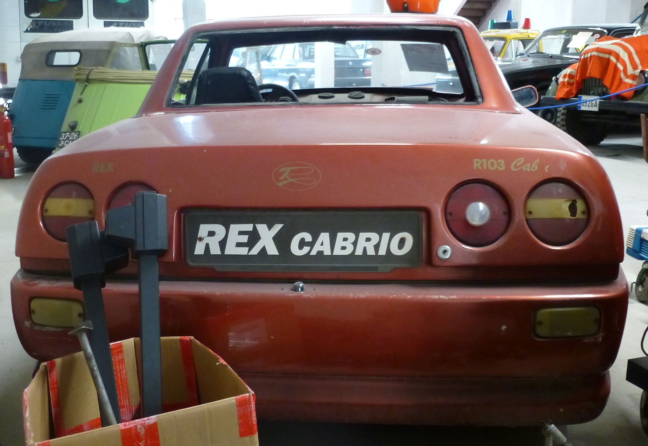 Rex Vilgas 1994